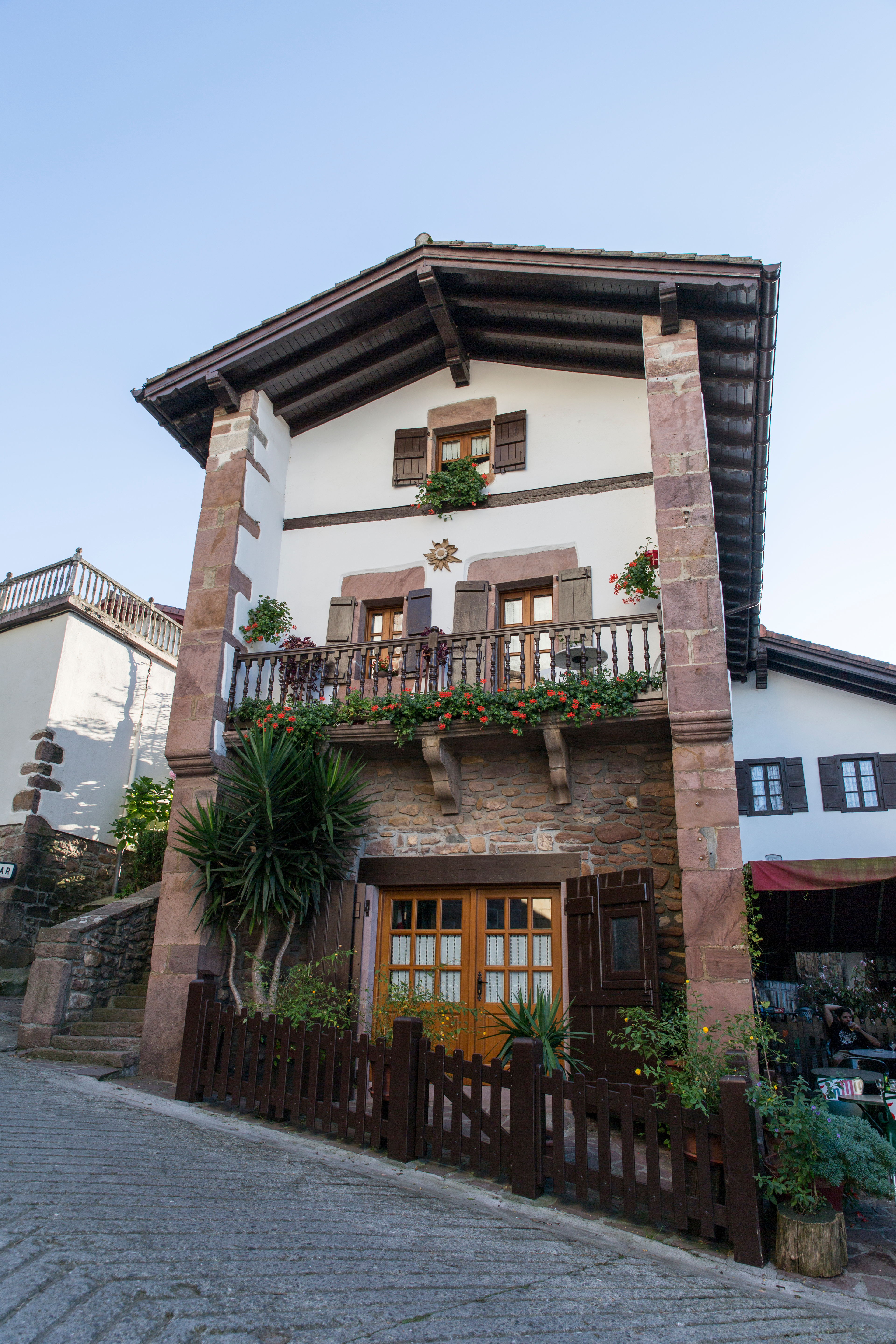 Eguzkilore